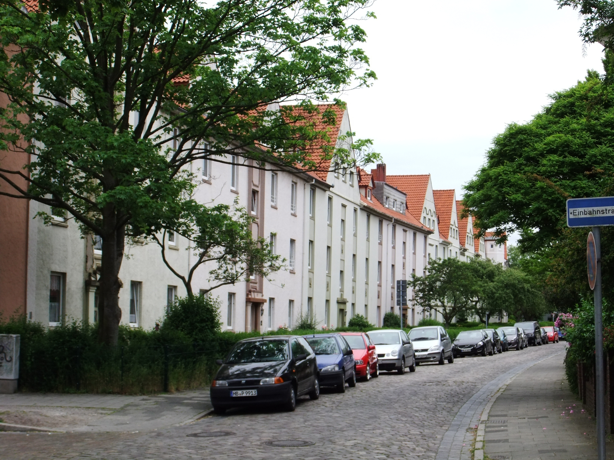 Städtische Wohnhausbauten, Wohnhausgruppe I-IV in Bremerhaven, Anton-Schumacher-Straße 4 . Die Gesamtanlage ist ein geschütztes Kulturdenkmal in der Freien Hansestadt Bremen, mit der Nr. 3251 beim Landesamt für Denkmalpflege registriert.